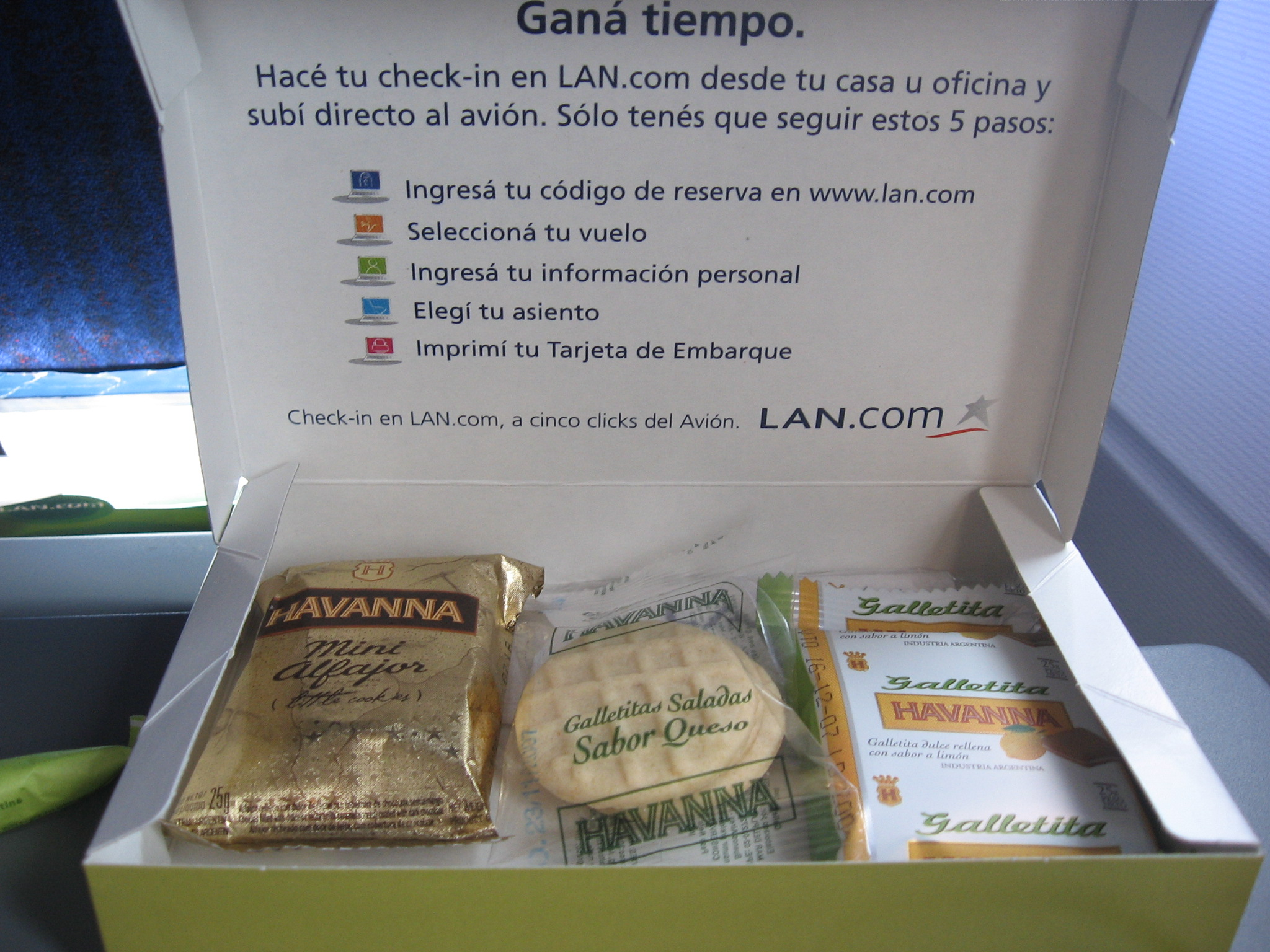 Serivico a bordo en vuelo de LAN AEP-BRC